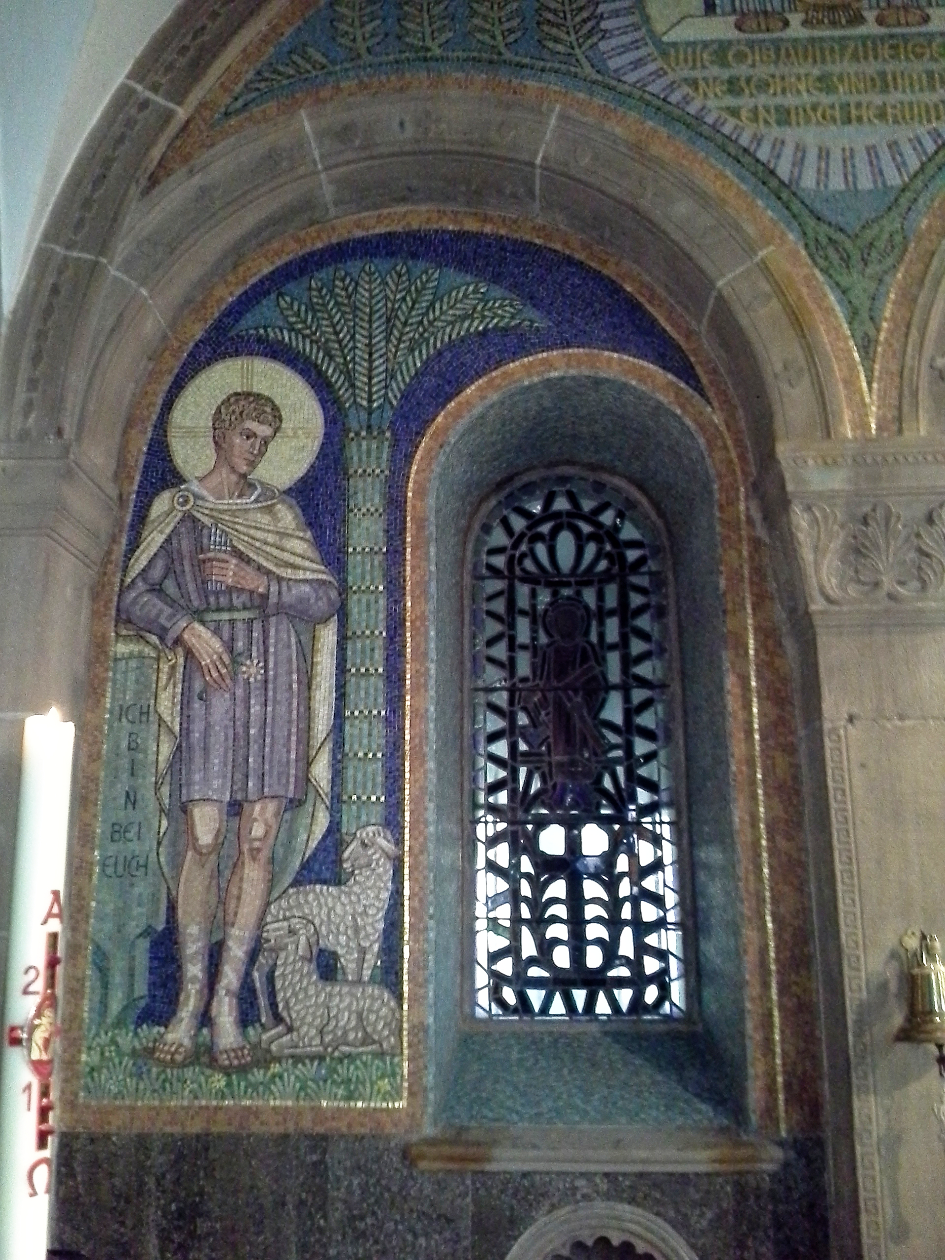 Trier St. Martin, Mosaik